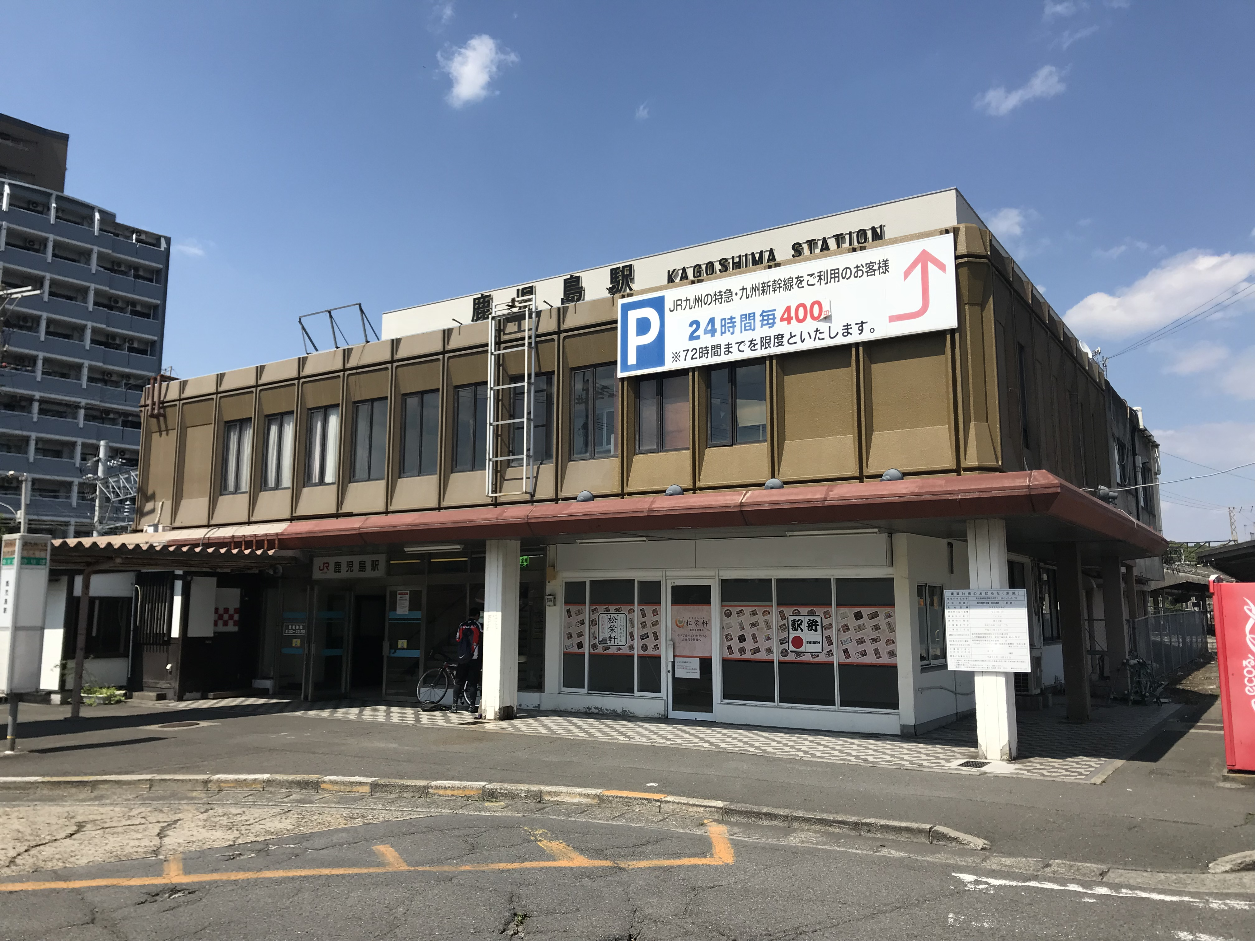 鹿児島駅の駅舎